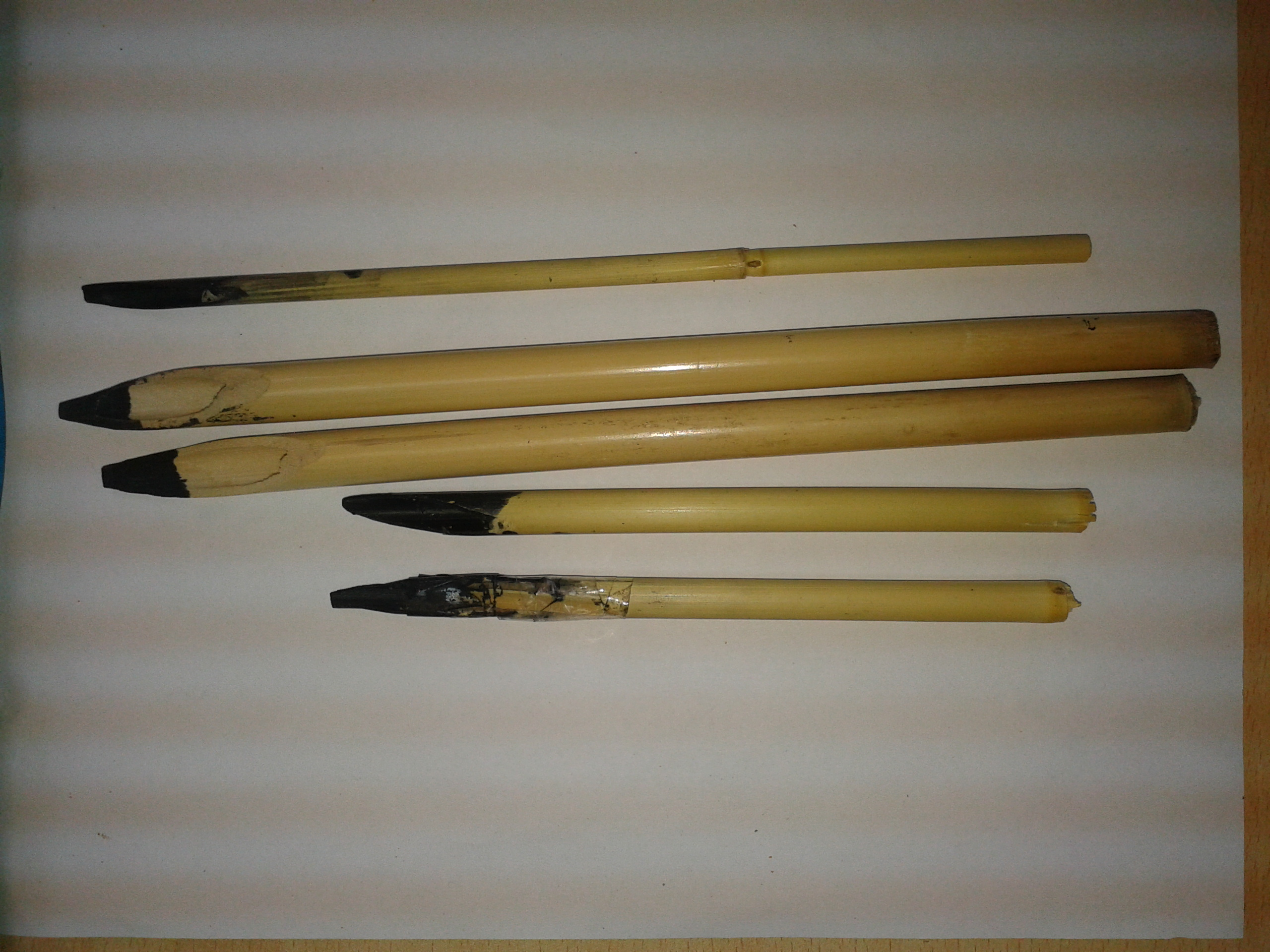 Srpski (latinica): Pero od trske.